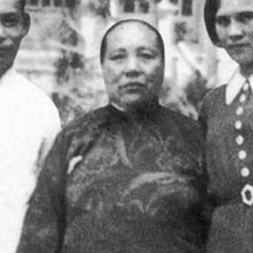 Mao Fumei, prima moglie di Chiang Kai-shek Fonte: .cn